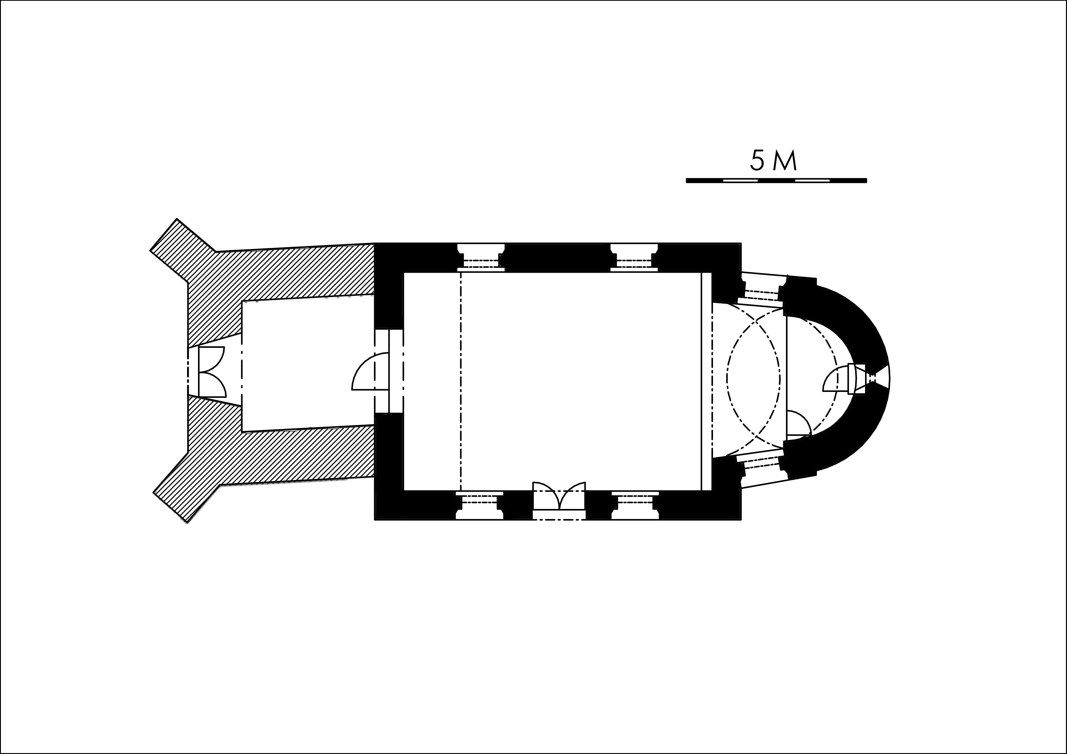 Půdorys